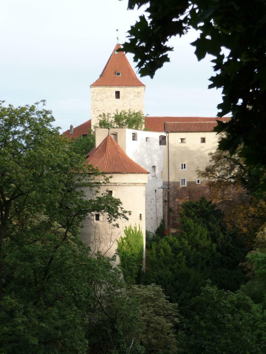 Daliborka-Turm vom Schlossgarten